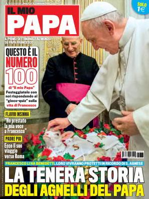 Copertina della rivista Il mio Papa 3 febbraio 2016, Arnoldo Mondadori Editore.